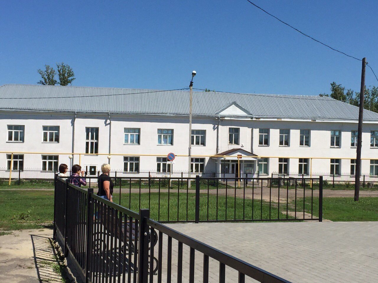 Новопокровская школа